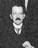 Le Docteur Hans O. Behrens, allemand, en 1913 (1er mars à Paris, rue Duphot), premier Président de la F.I.L.T.